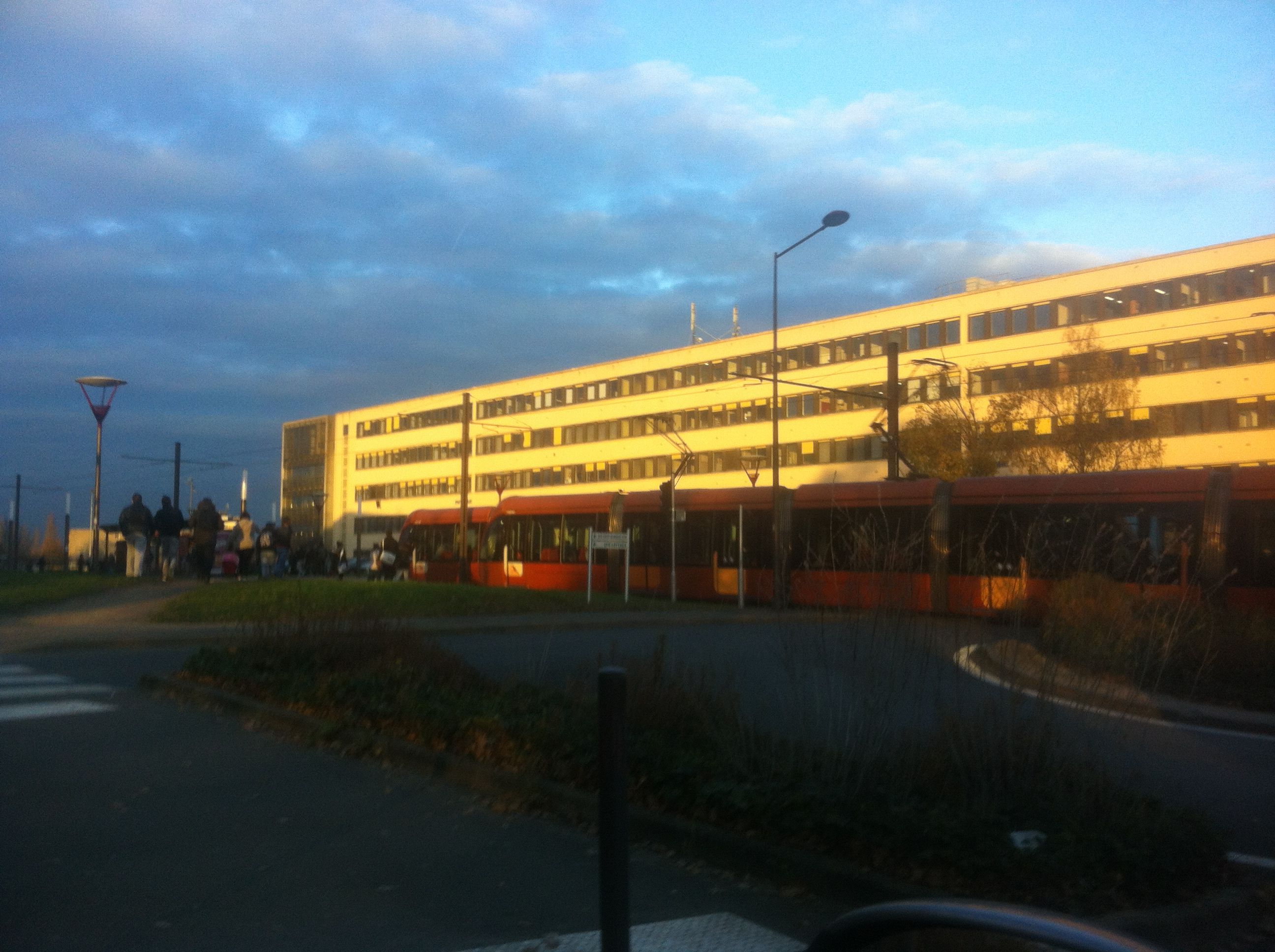 Fac de Sciences